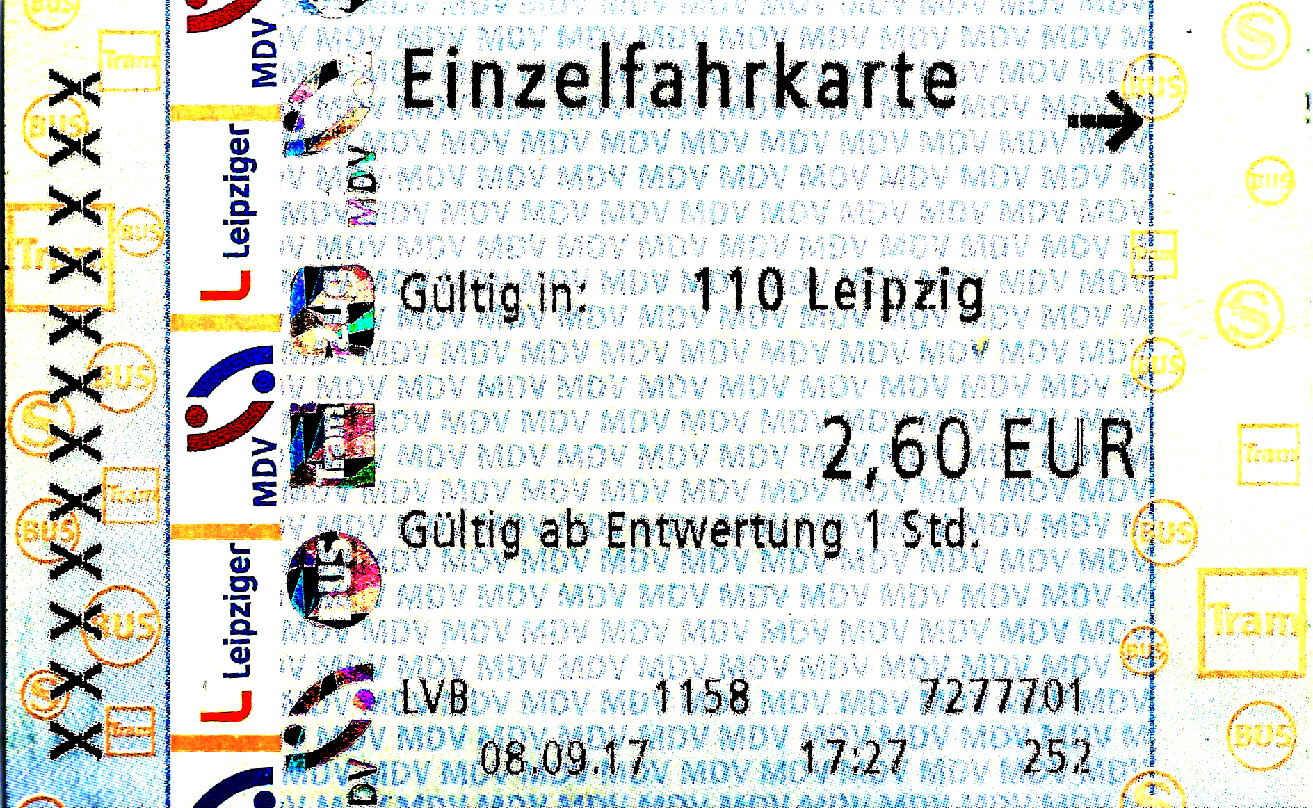 Einzelticket Erwachsener Mitteldeutscher Verkehrsverbund (MDV), gültig für "110 Leipzig", ausgegeben durch die Leipziger Verkehrsbetriebe (LVB)